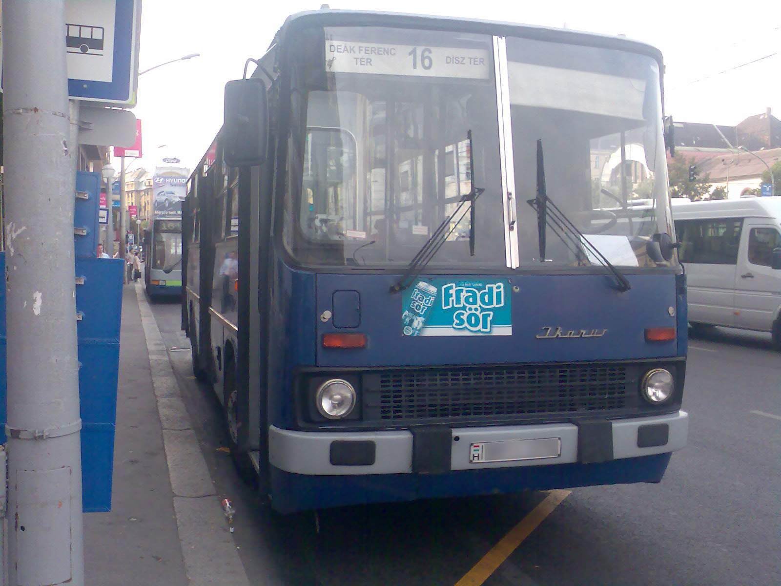 Ikarus 260 típusú autóbusz, BPI-278-as rendszámmal (Budapest, V. ker., Deák Ferenc tér)